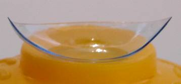 Querschnitt durch eine Kontaktlinse